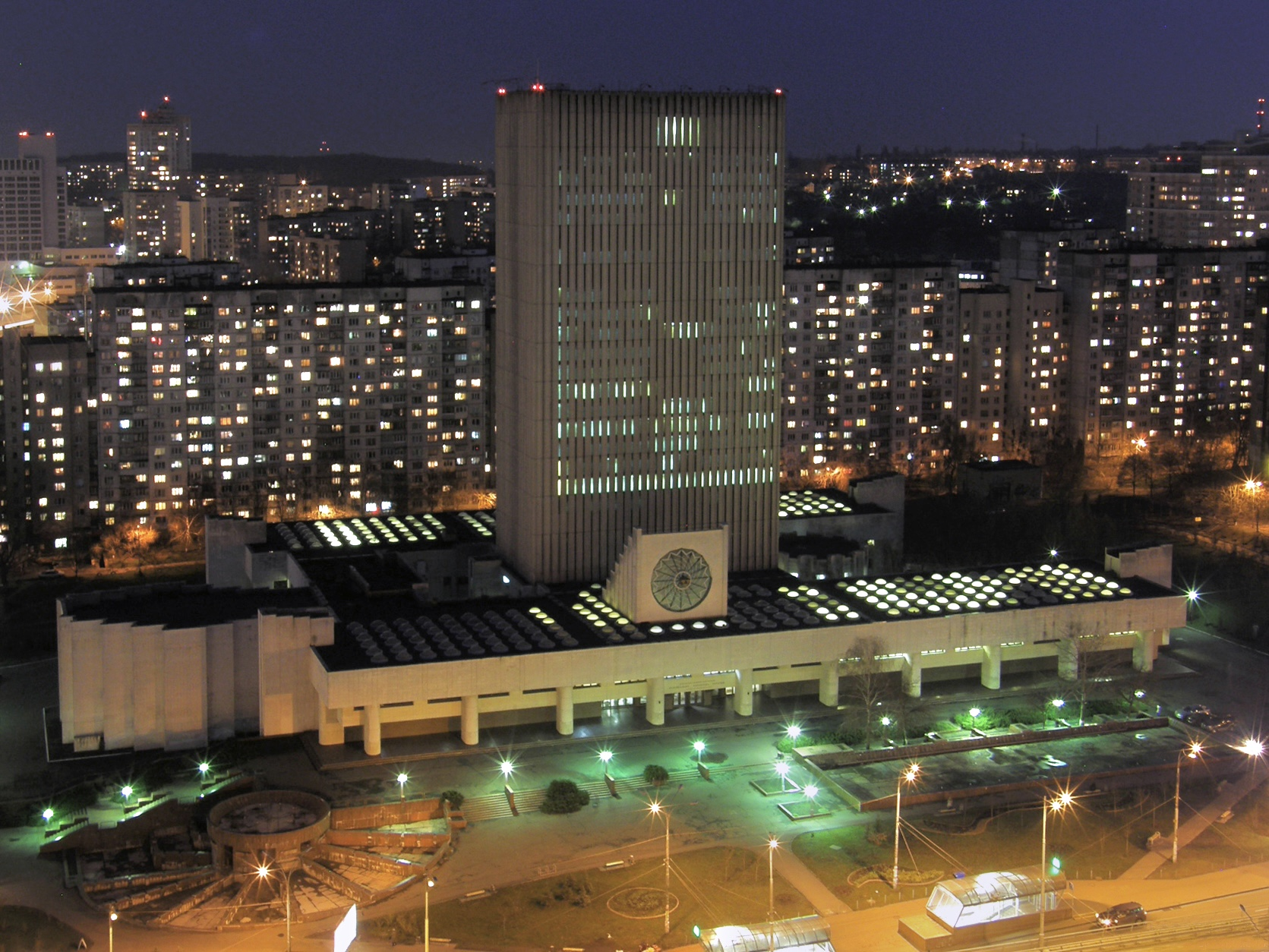 Национальная библиотека имени В. И. Вернадского в Киеве